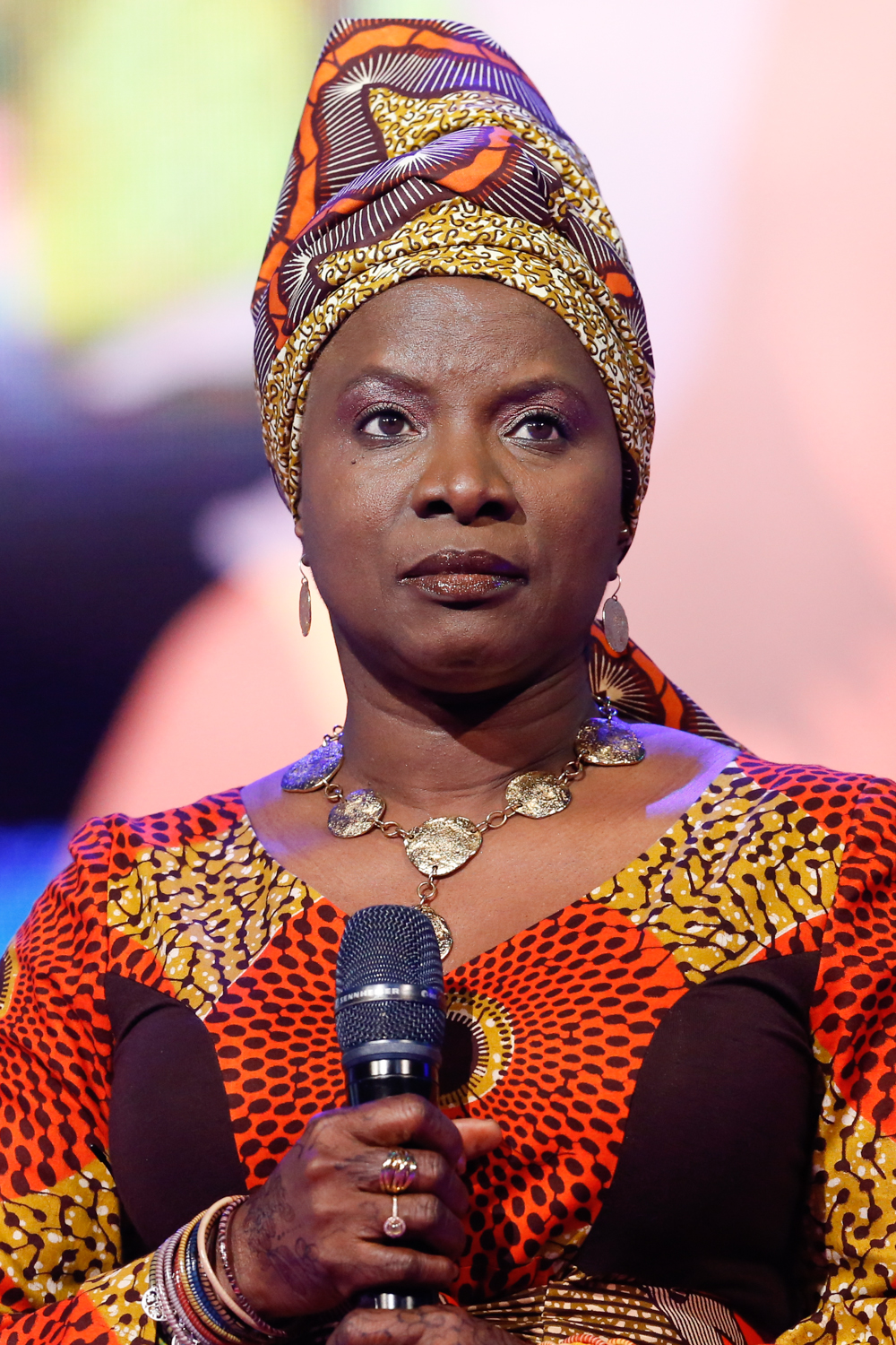 Angelique Kidjo durante o 25o Premio da Musica Brasileira no Theatro Municipal. Foto: Roberto Filho (14/05/14)